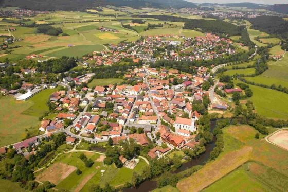 Luftaufnahme aus dem Gemeindearchiv